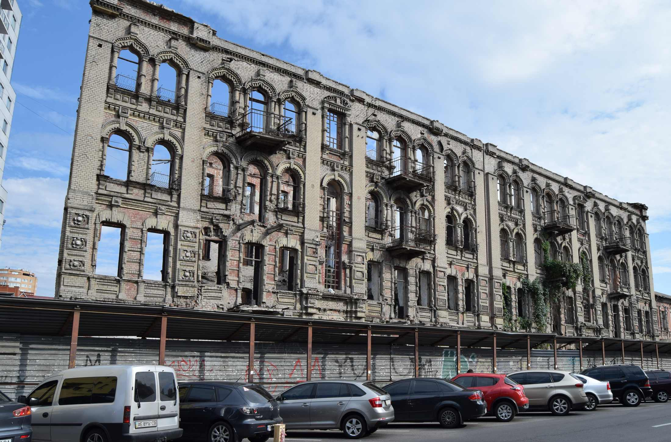 Будинок прибутковий, Дніпро, вул. Харківська, 6